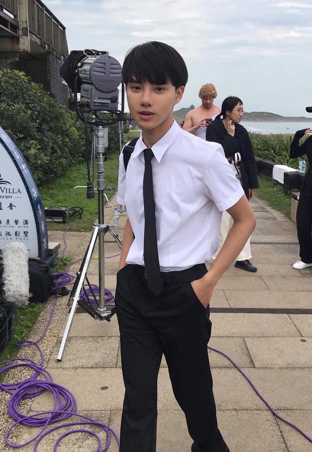 中文（台灣）: 廣告工作花絮（小安 安原申）